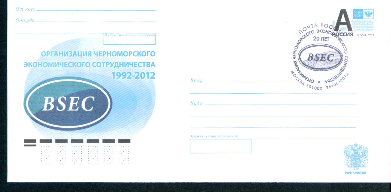 BSEC 20 почтовый конверт Россия